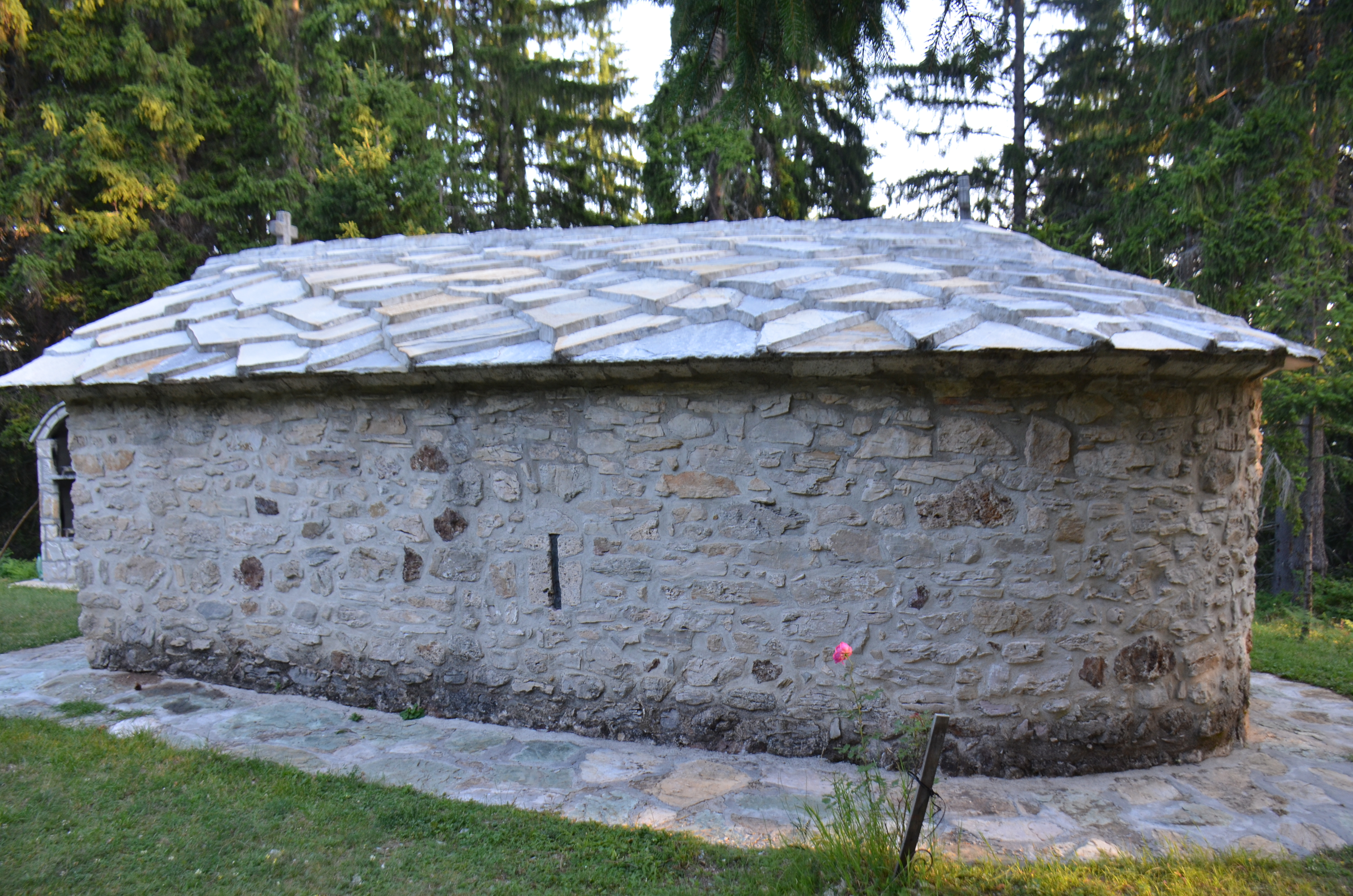 Црква Светог Николе, село Рудно, општина Краљево, Рашки округ